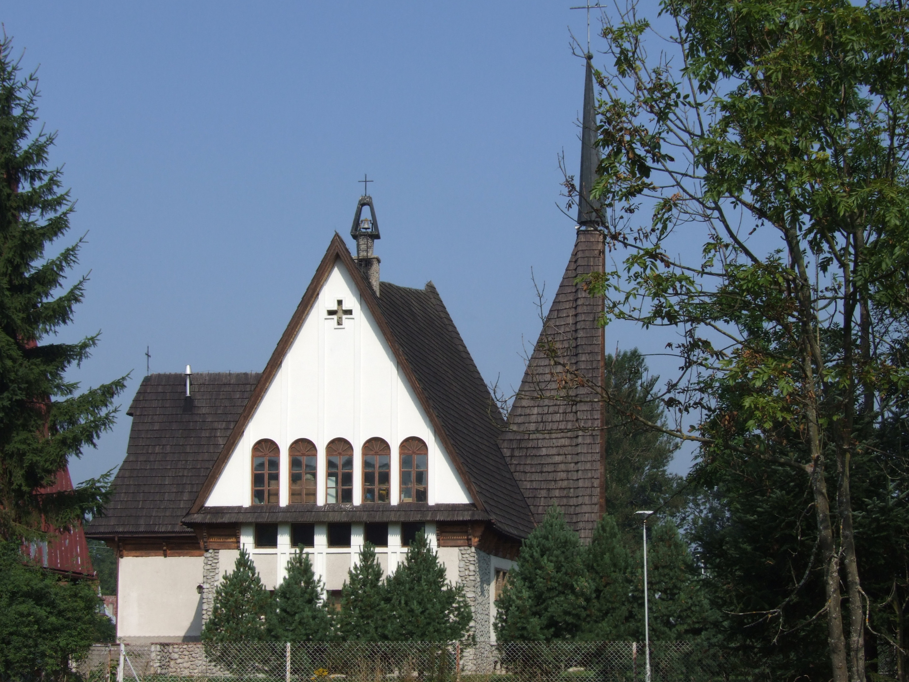 Kościół w Podczerwonem